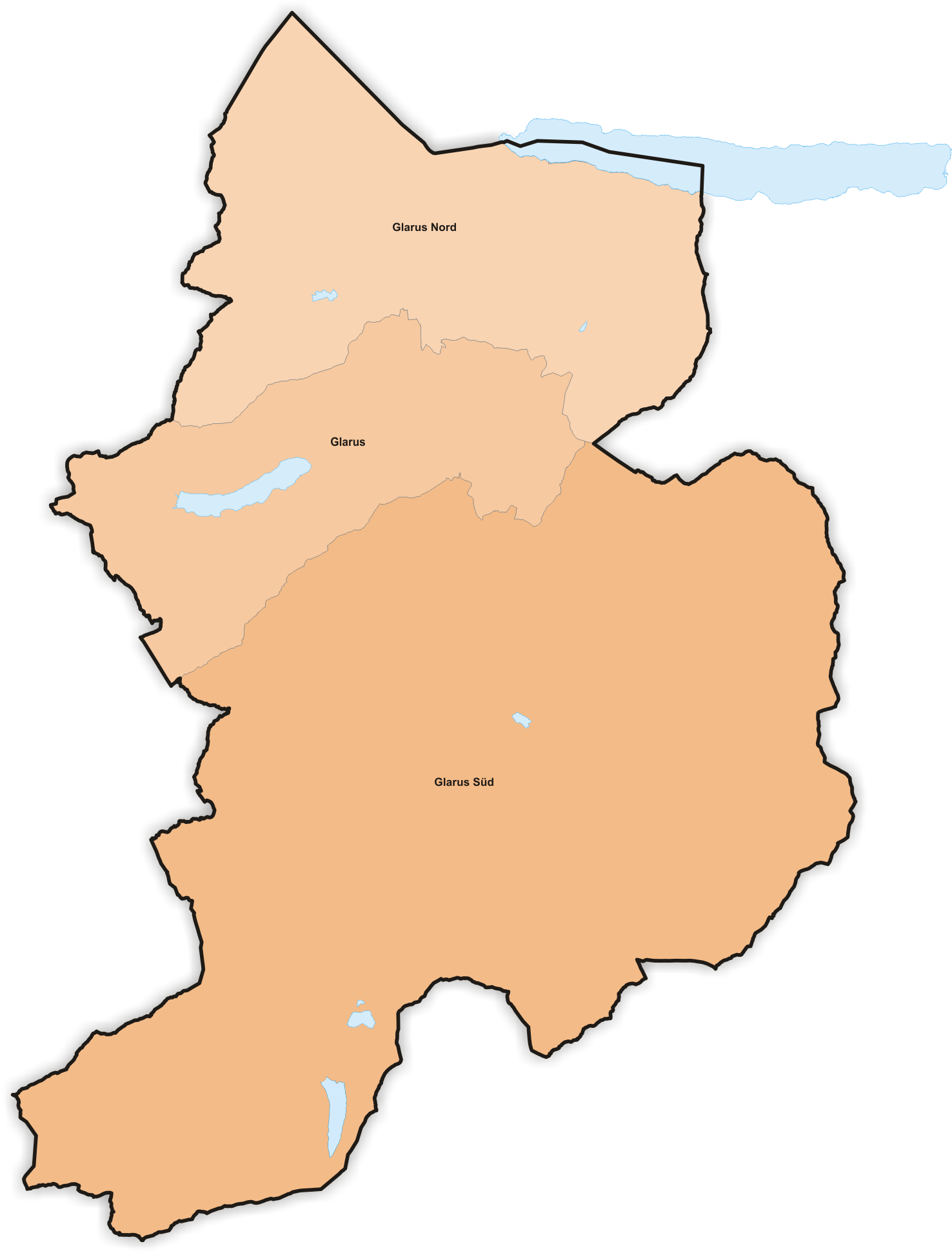 Municipalities in Canton Glarus